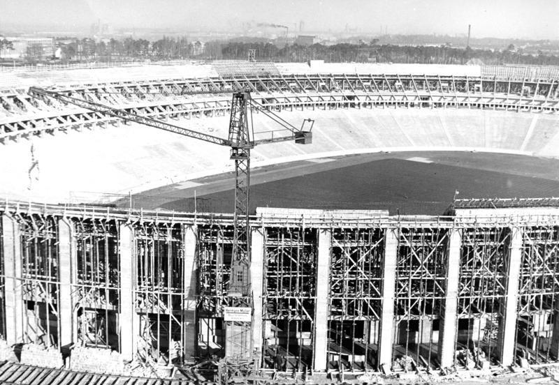 Berlin Bau des Reichssportfeldes